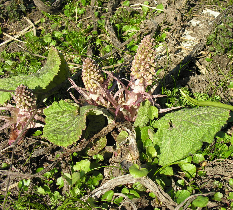 Pilkalapis šaukštis (Petasites spurius) Šeima. Astriniai (Asteraceae) Foto: Algirdas, 2006 m. balandžio 23 d.